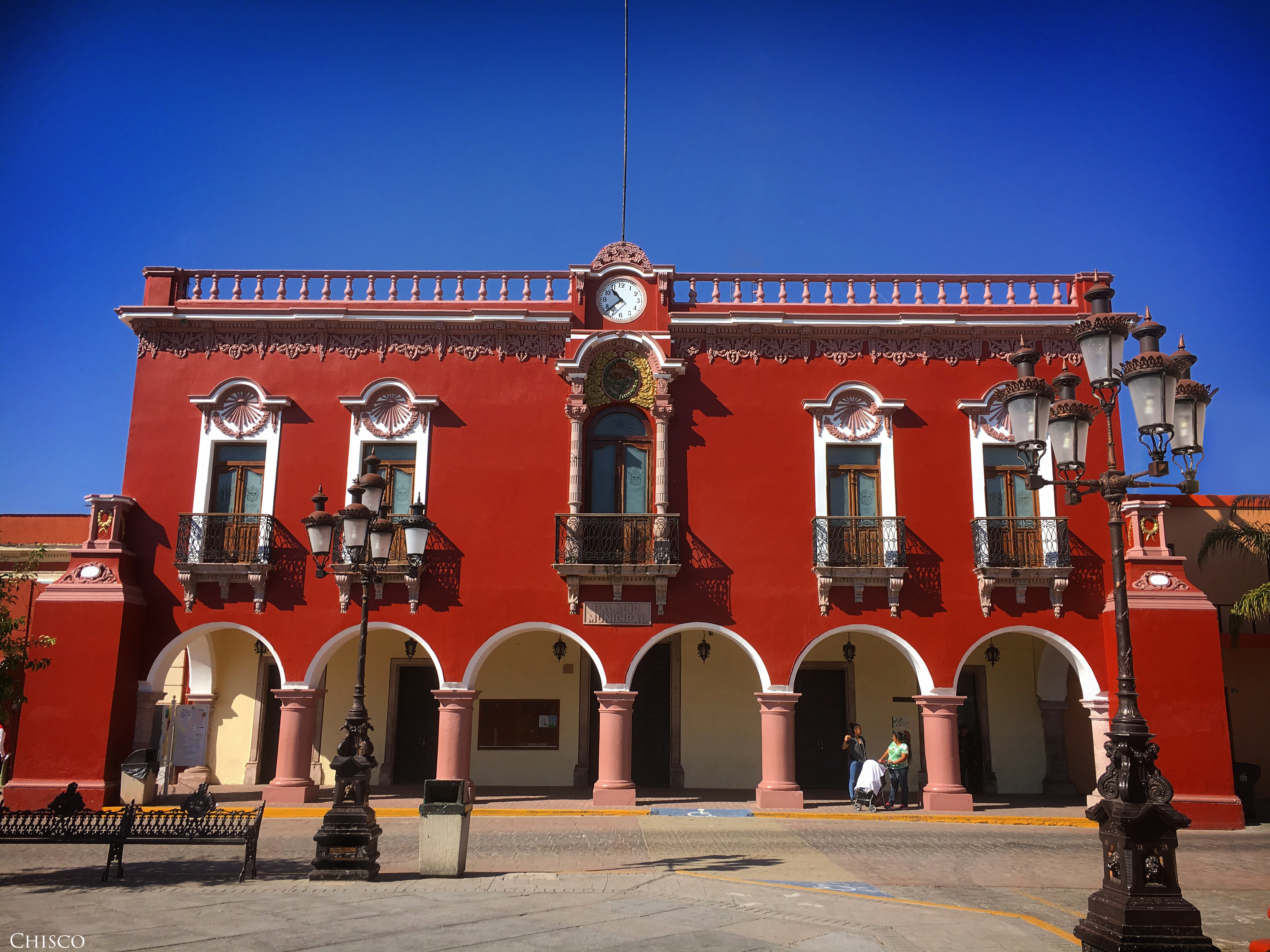 Palacio o presidencia municipal, edificio neoclásico del siglo XIX.